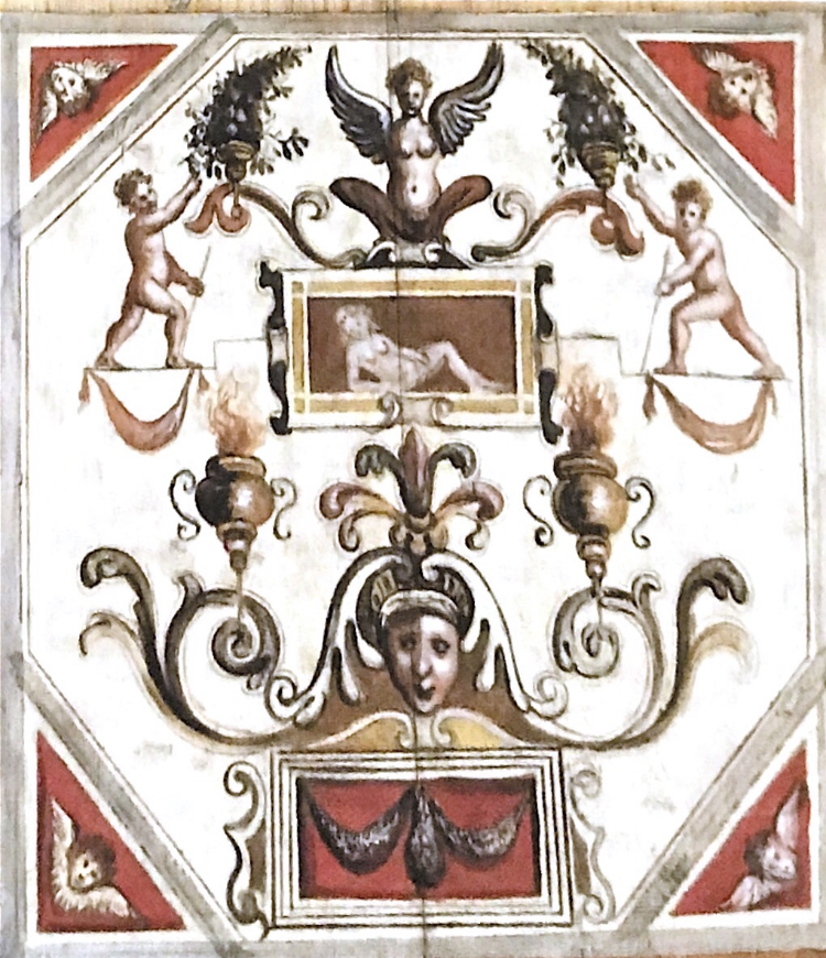 cassettone